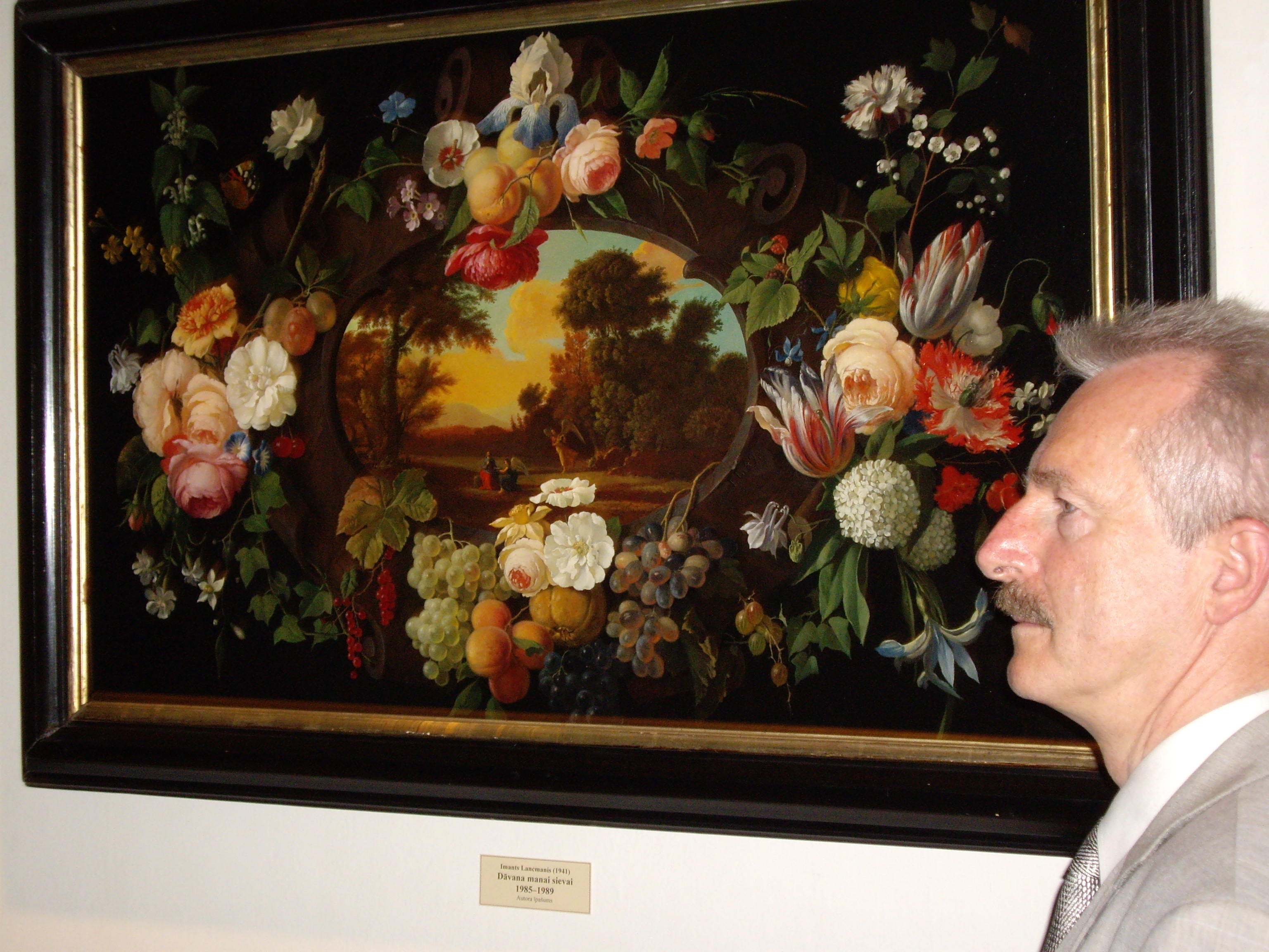 Imants Lancmanis vor einem eigenen Bild